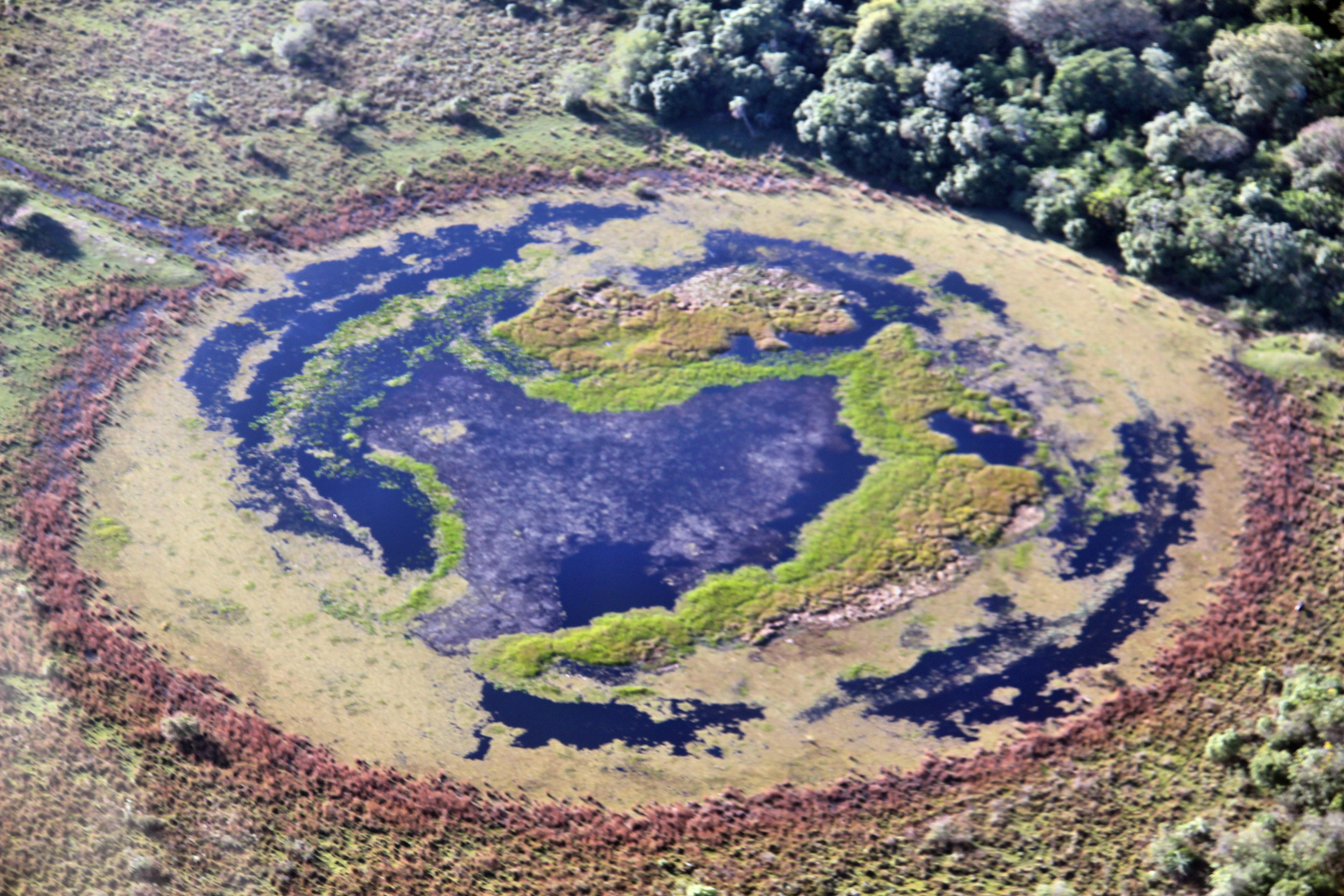 Esteros del Ibera, Corrientes